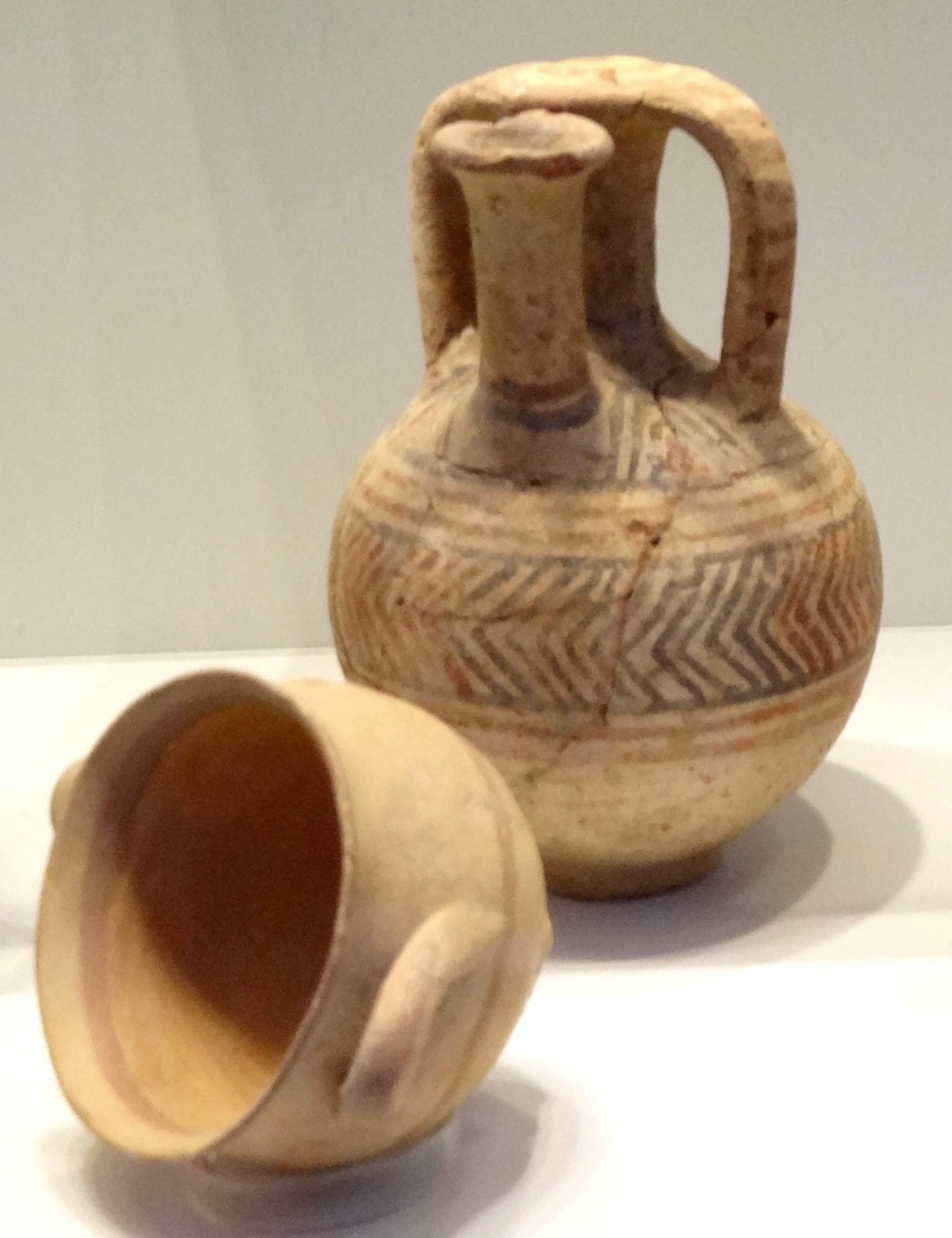 Philistine pottery קרמיקה פלשתית Bowl from Tel Miqne Jar from Azorl מימין פך ארכוב מאזור, משמאל קערית מתל מקנה - עקרון, המאה ה-12 עד ה-11 לפני הספירה